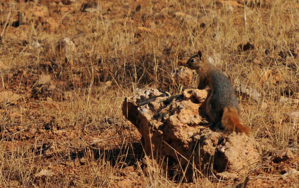 Kurdî: Li navbera Mêrdîn û Amedê hatiye kişandin.